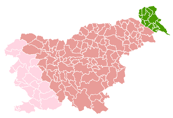 Občine današnje Slovenije, glede na pripadnost Avstriji oz. Madžarski (v Avstro-Ogrski) in Italiji (z Rapalsko pogodbo). Iz sl::Slika:Obcine.png pobarval romanm (pogovor).